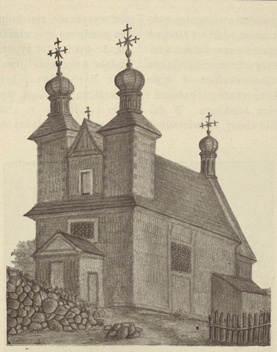 Беларуская (тарашкевіца): Дудзічы (Dudzičy). Царква